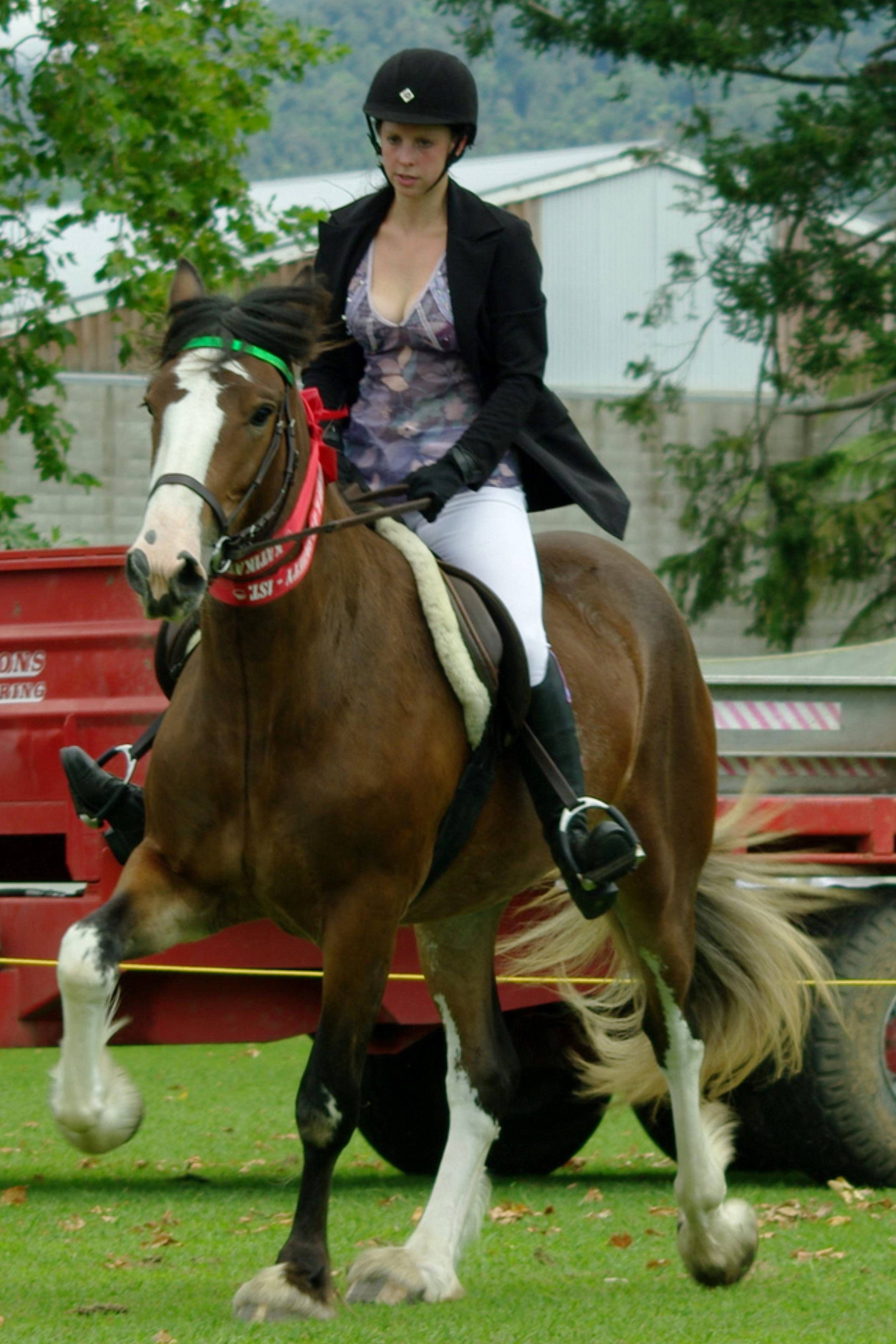 Katikati A & P Show.